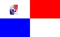 Bandera de Fernando de la Mora, Paraguay